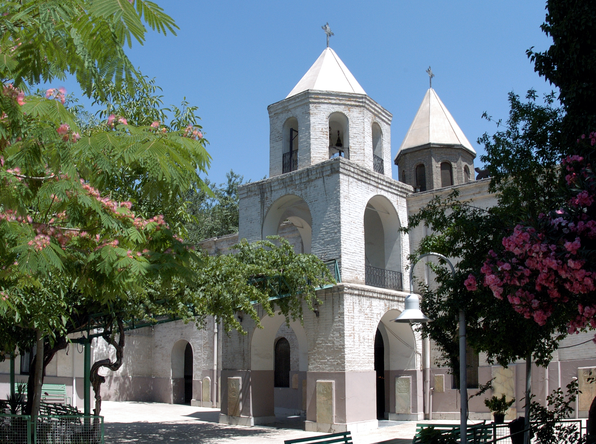 հայկական եկեղեցի Թեհրանում